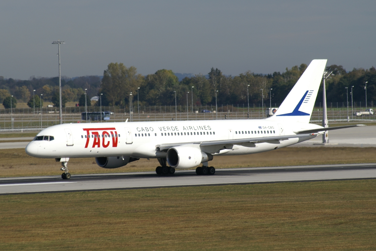 TACV Cabo Verde Airlines Boeing 757-200 D4-CBG at Munich Airport